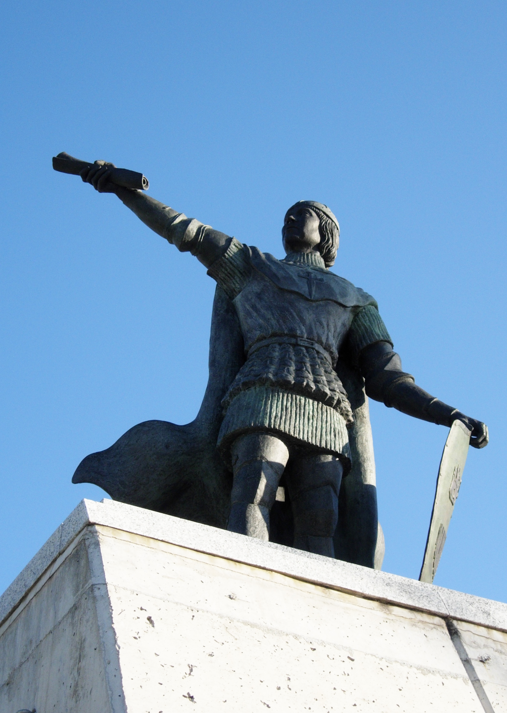 Estatua en bronce de Gonzalo Chacón, Arroyomolinos (Madrid) España